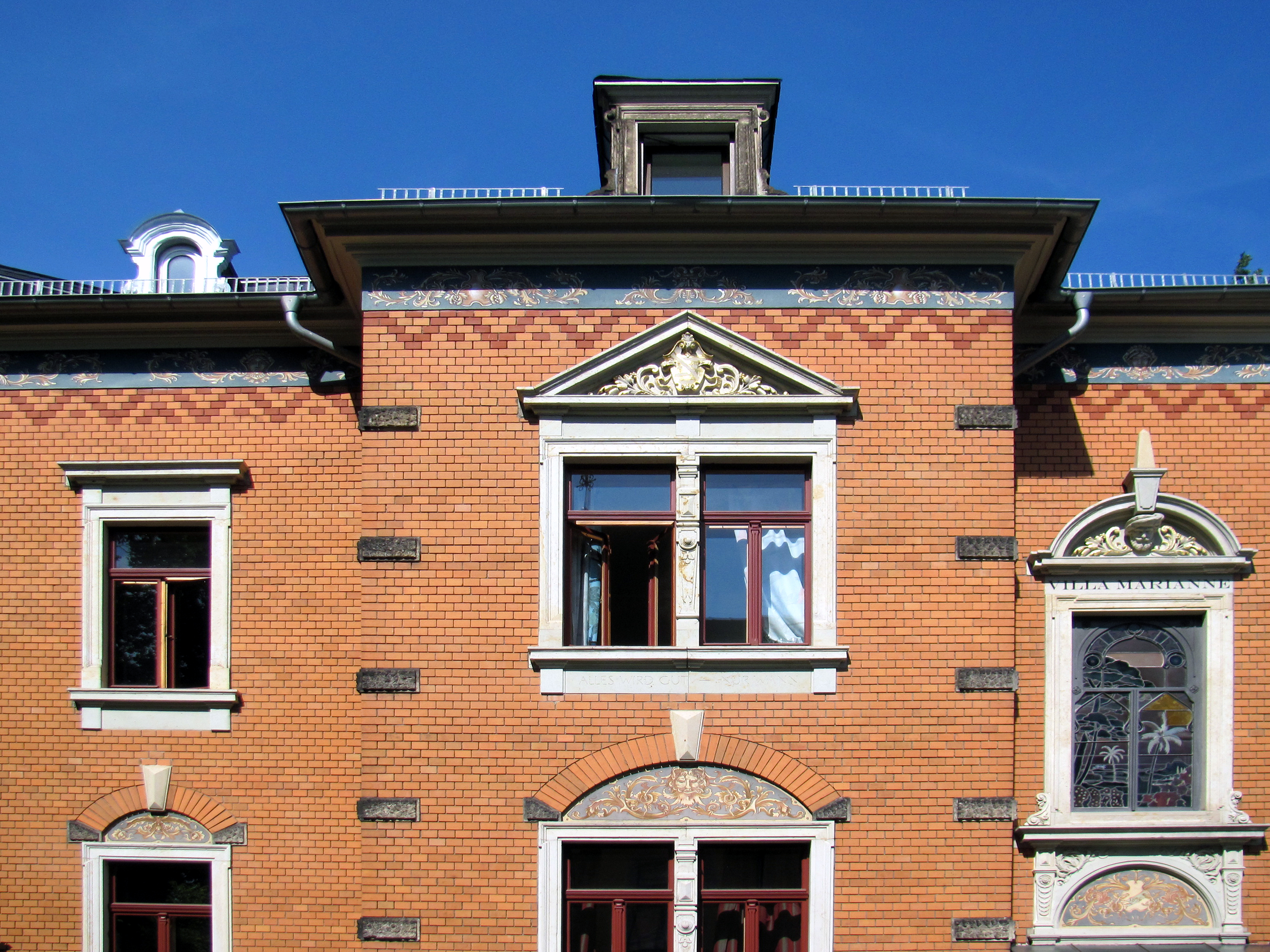 Radebeul Villa Marianne